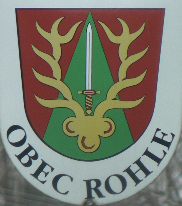 Znak obce Rohle